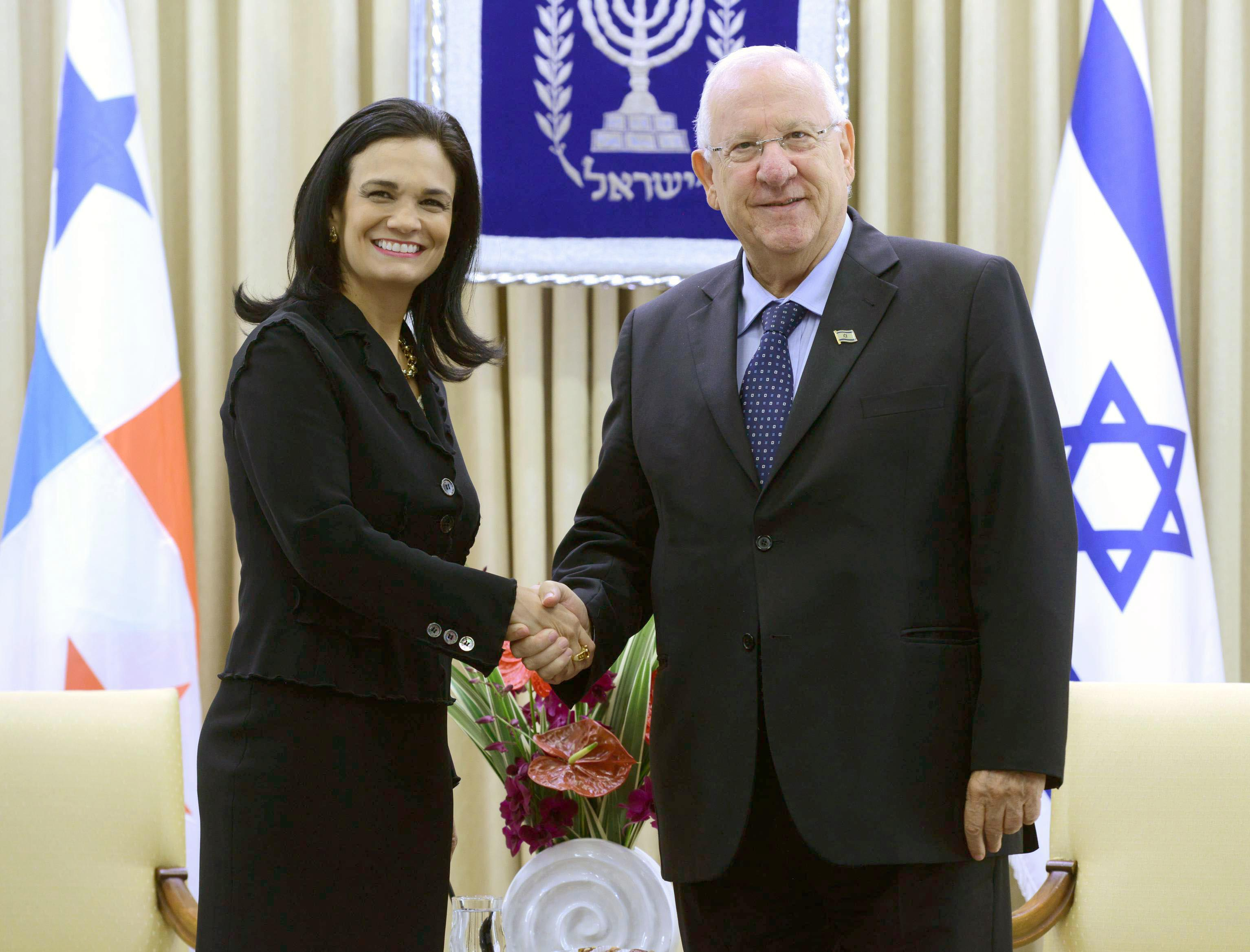 סגנית הנשיא ושרת החוץ של פנמה איזבל סט מאלו בפגישת עבודה עם נשיא מדינת ישראל ראובן ריבלין